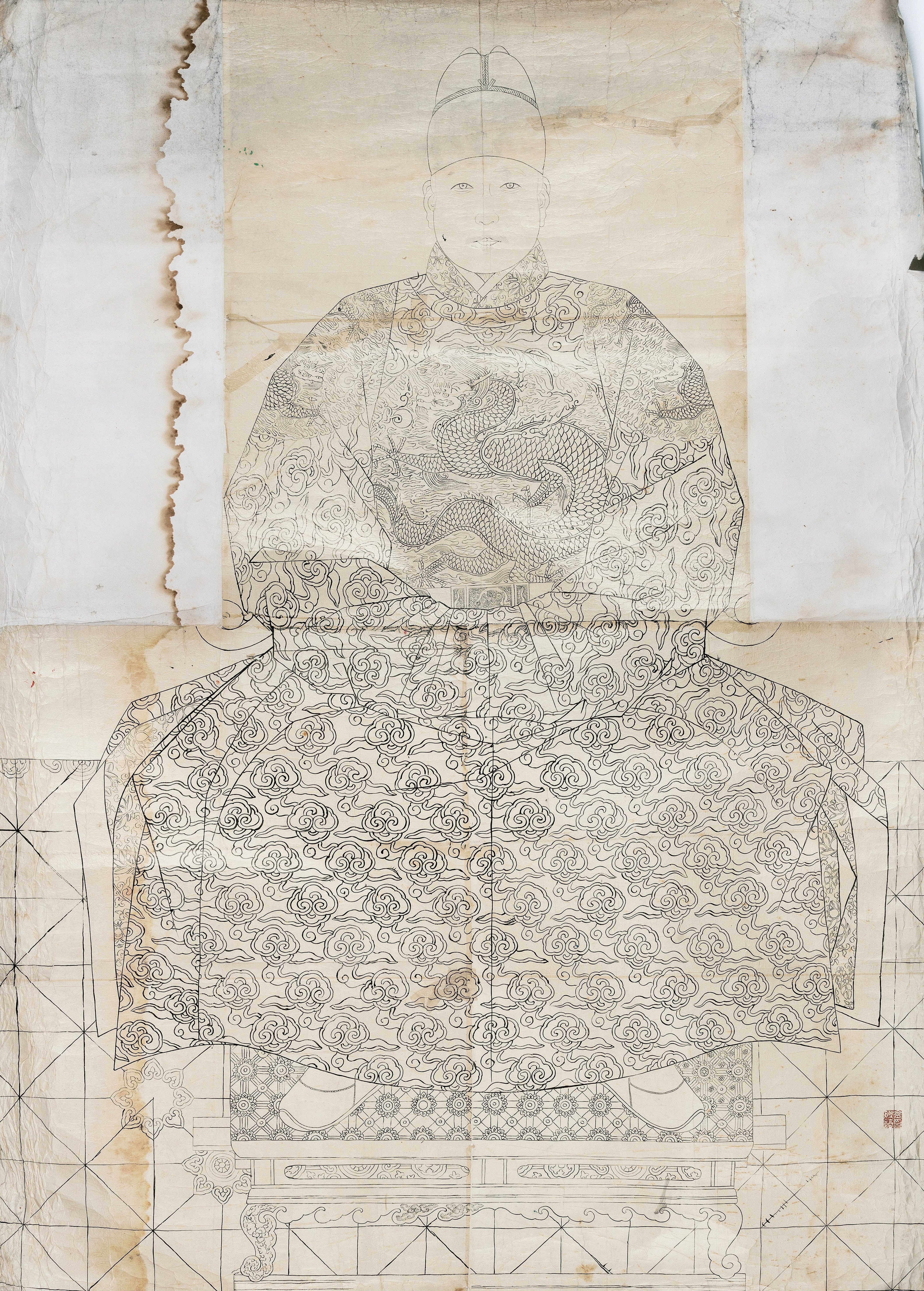 조선 7대 국왕 세조 어진 초본, 1927년 이당 김은호 모사본